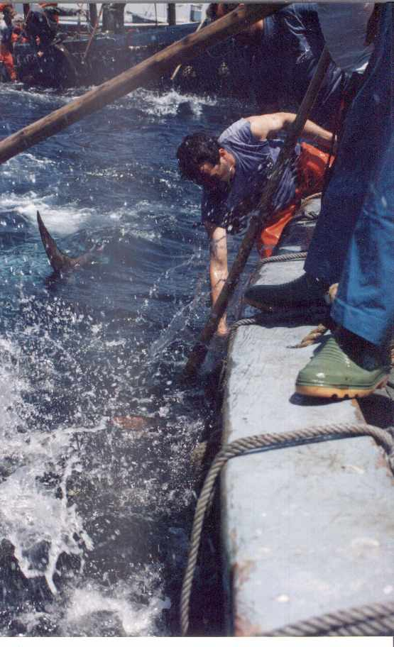 esca con Bicheros